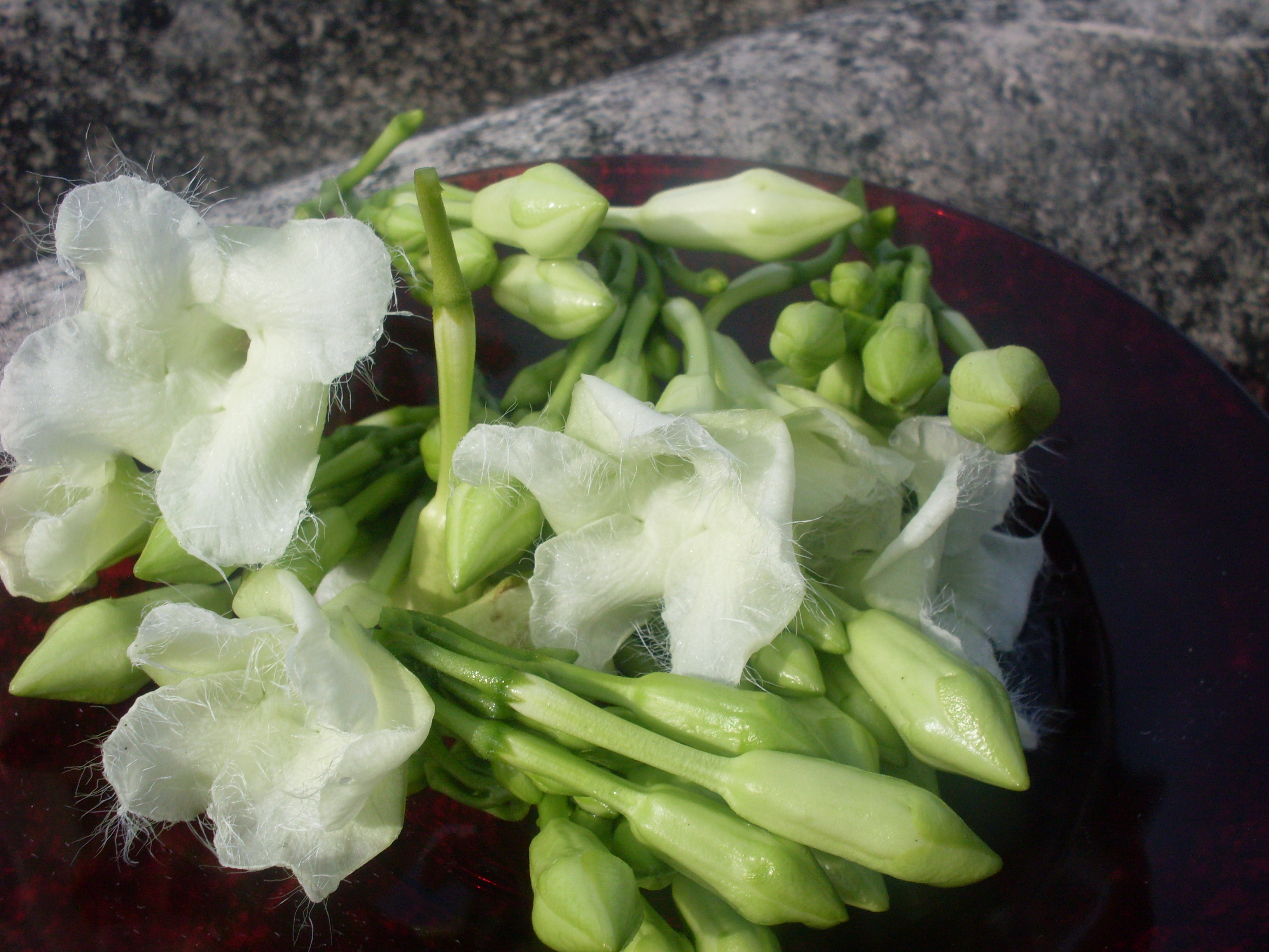 Loroco nativo de El Salvador 5